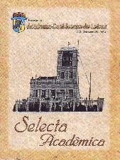 Capa da Revista Selecta Acadèmica - Publicação mensal da Academia Caetiteense de Letras - Scan do original, autorização expressa de André Koehne - Comissão Editorial da ACL.